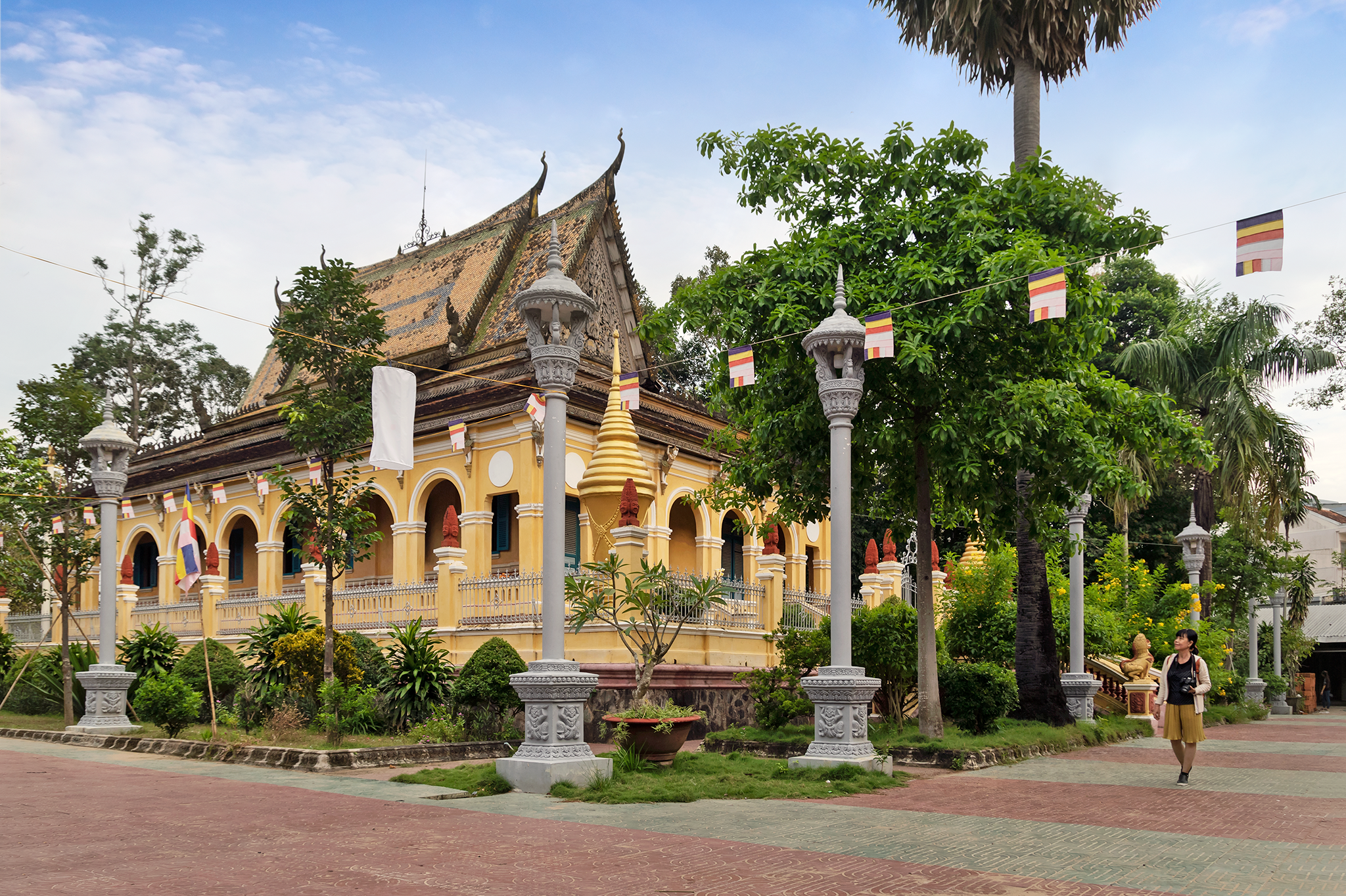 Chùa Ông Mẹt (tên thường gọi) là một ngôi chùa Khmer cổ; hiện tọa lạc tại phường 1, thành phố Trà Vinh, Việt Nam.